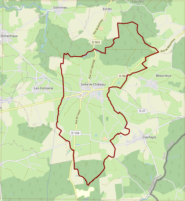 carte réalisée sur umap This map may be incomplete, and may contain errors. Don't rely solely on it for navigation.